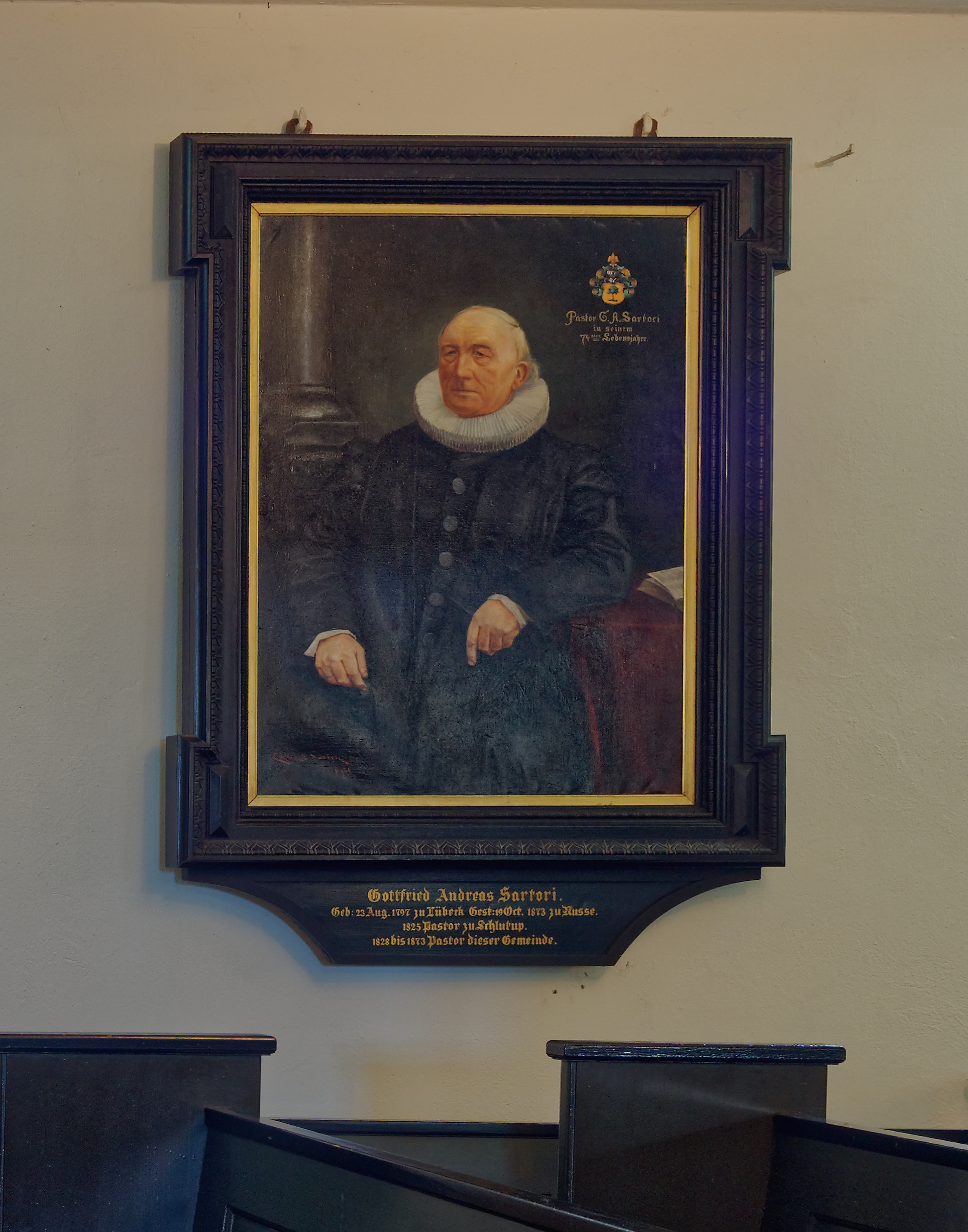 Kirche in Nusse, Innenraum, Epitaph